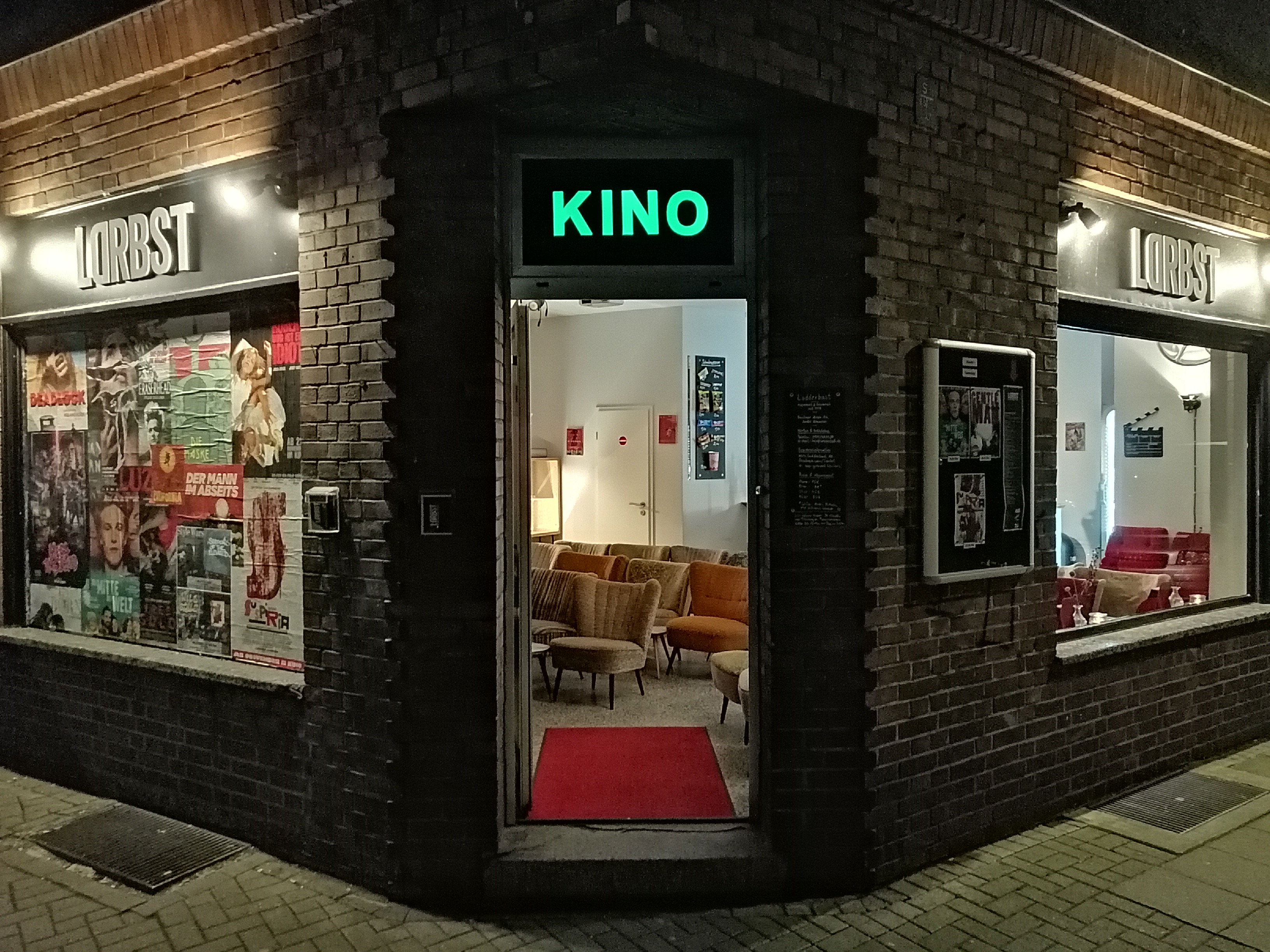 Eingang des Lodderbast-Kinos Hannover